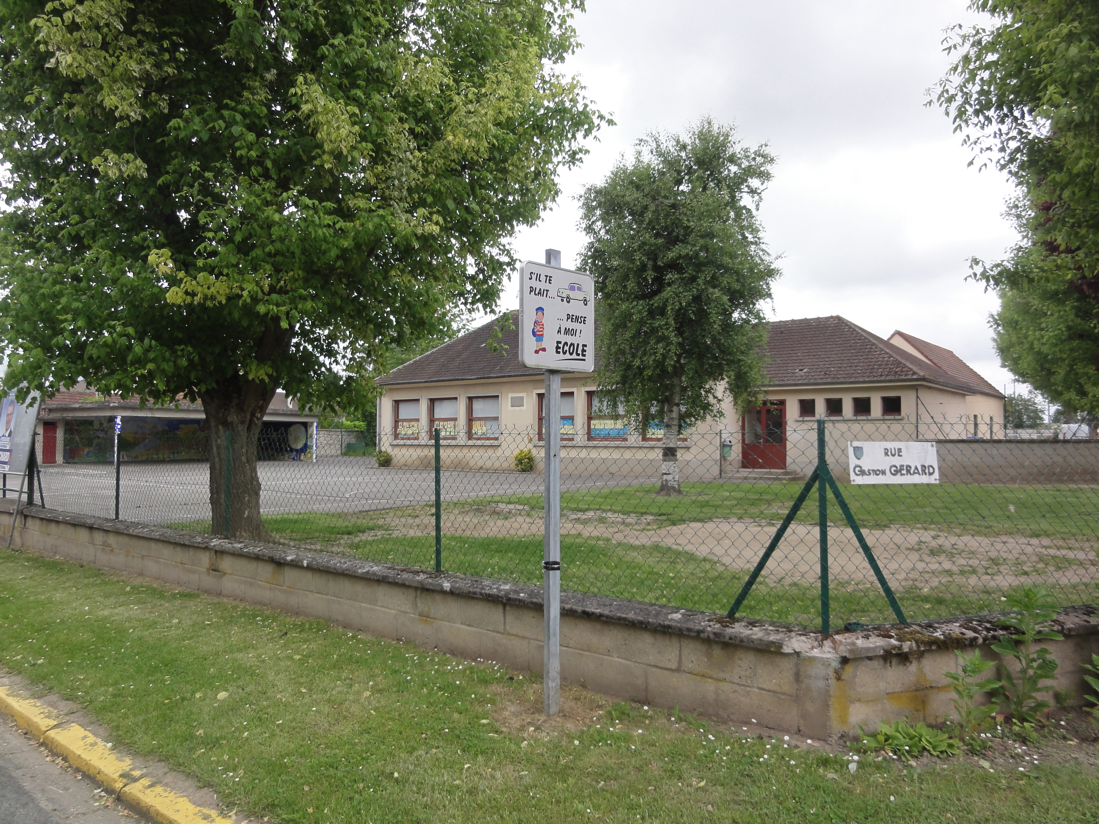 Bazicourt (Oise) École